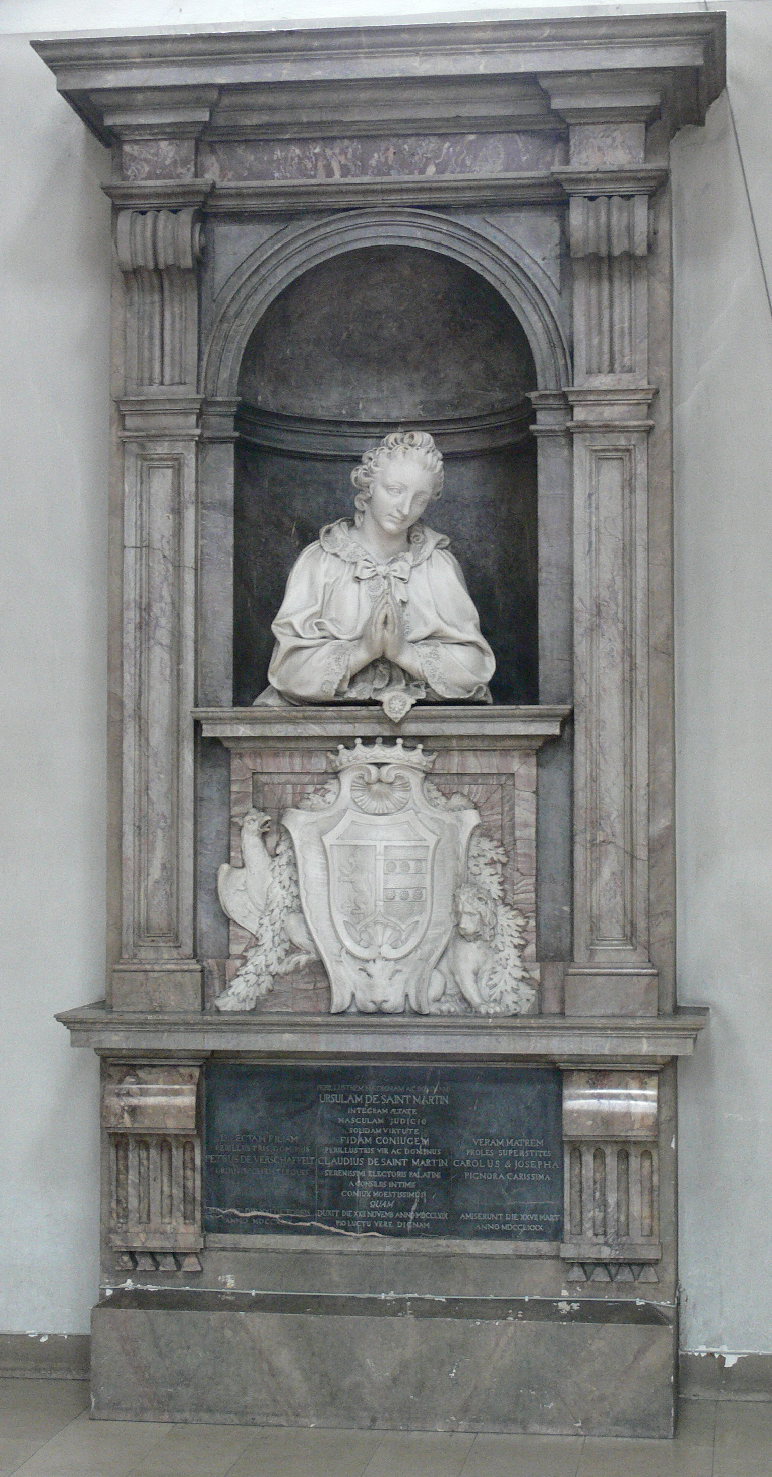 Heilig-Geist-Kirche (Kath. Pfarrkirche Hl. Geist), Schwetzingerstadt, Mannheim Peter Anton von Verschaffelt: Grabmal Ursula von Saint-Martin († 1760), Tochter von Peter Anton von Verschaffelt (übertragen aus der Schulkirche in L 1,1)